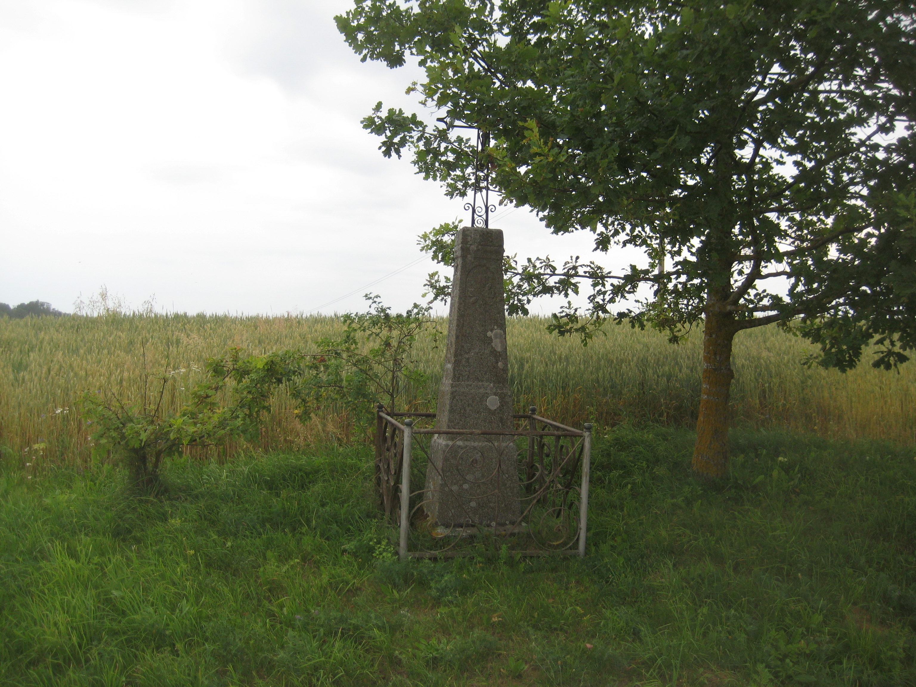 Bagdoniškis 42270, Lithuania